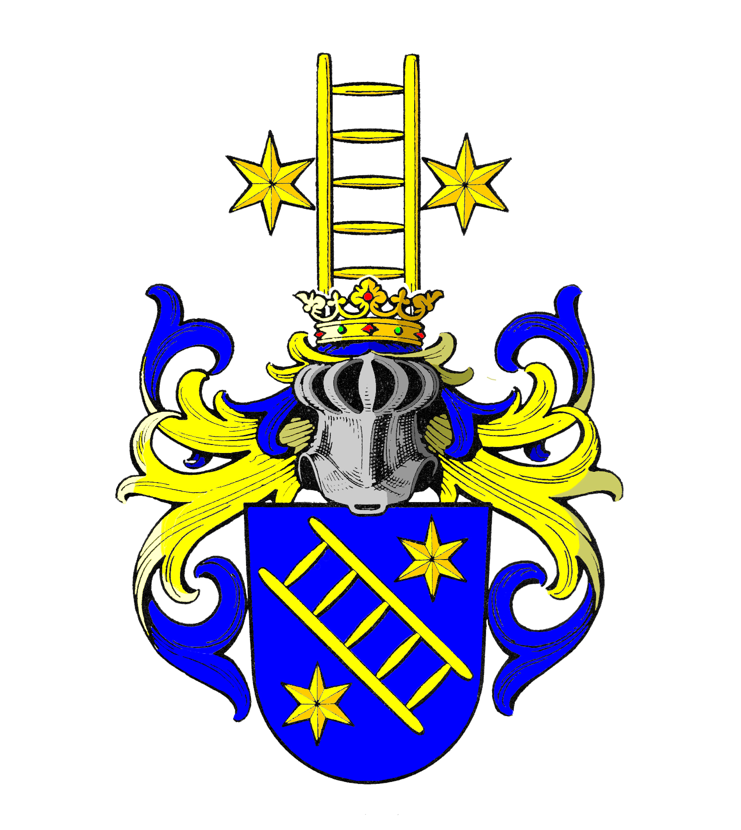 Wappen der Familie von Frank aus Cloz, Südtirol (eingetragen in der deutschen Wappenrolle, 1974)